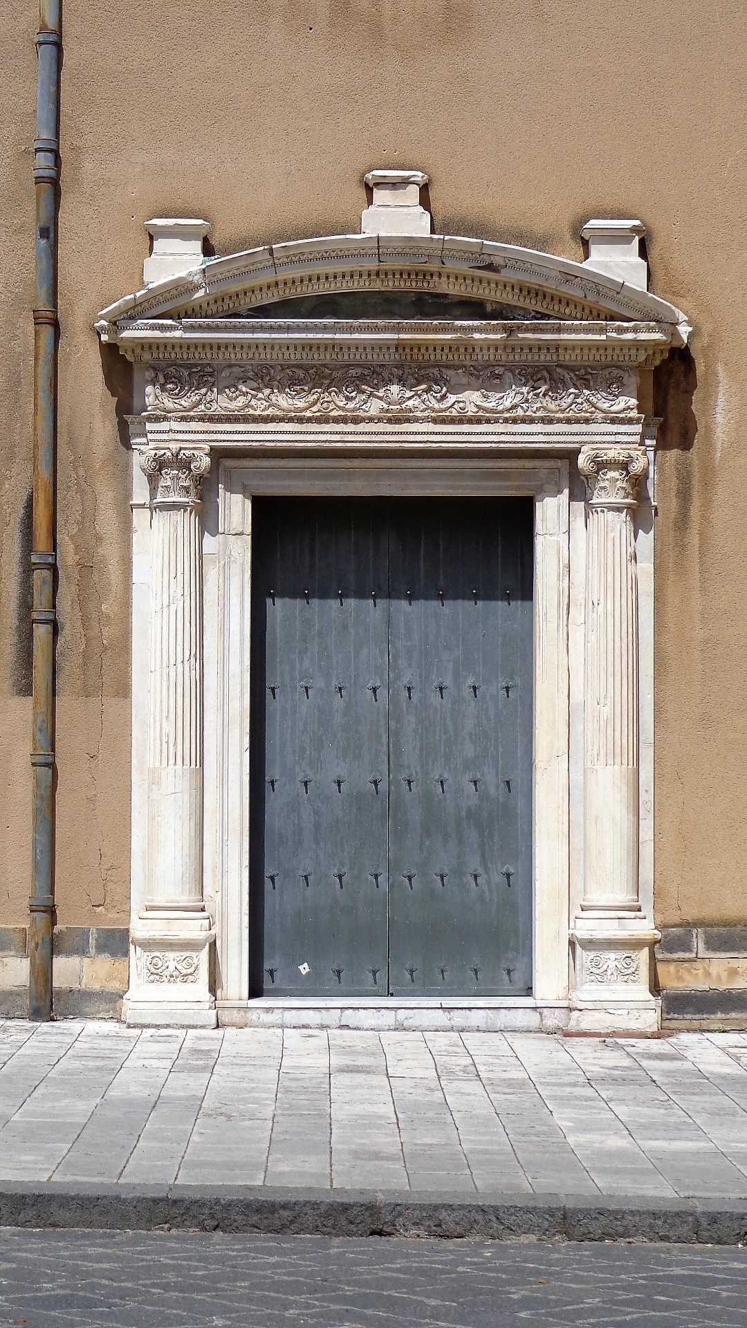 Portale laterale destro corrispondente alla 4 campata